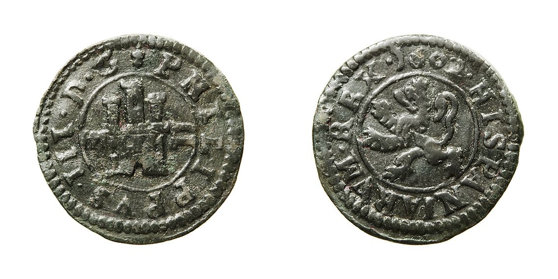 Moneda de dos morabatins encunyada a Segovia el 1602, regnant Felip III. Feta en coure.